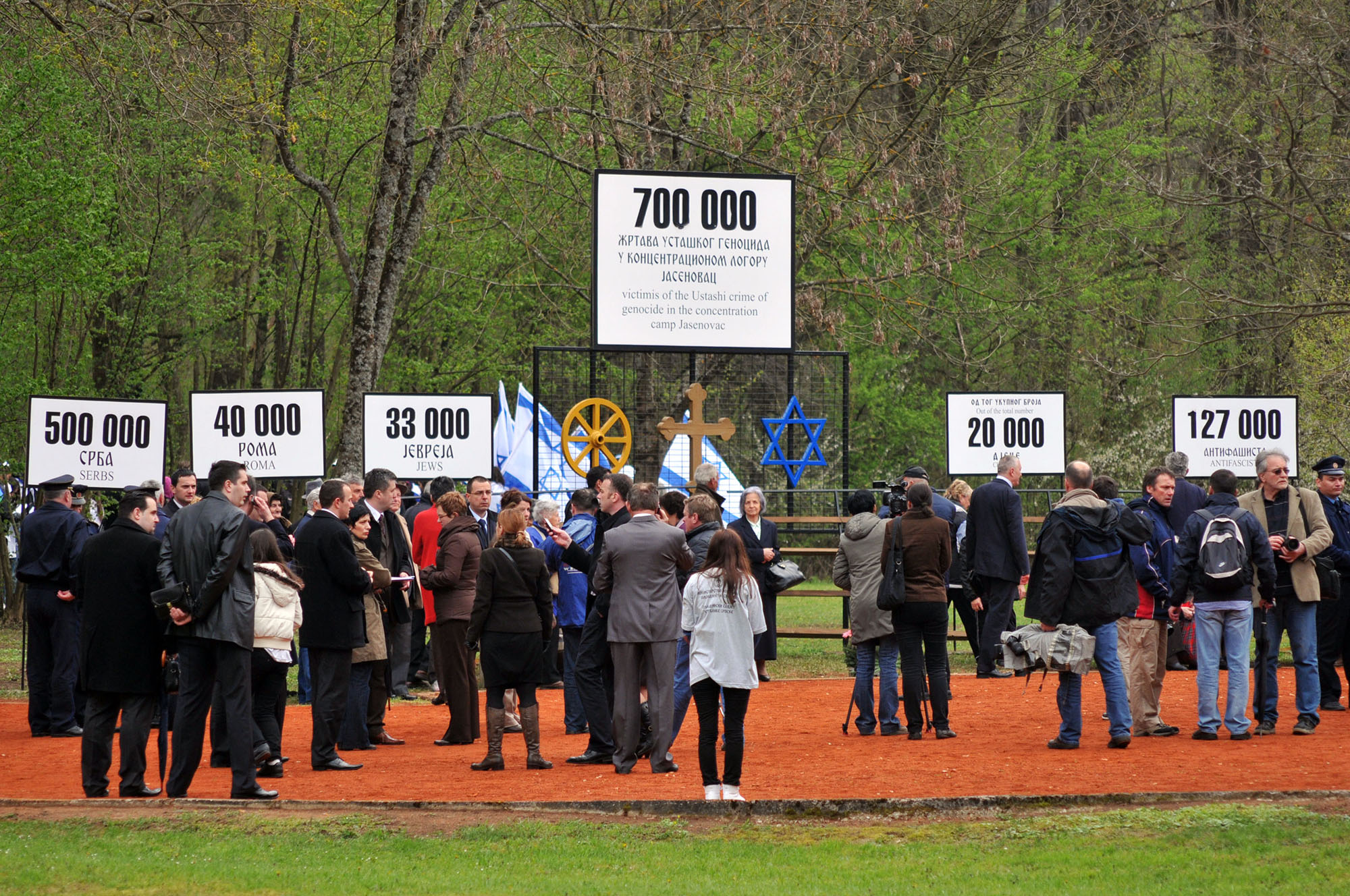 Donja Gradina Kozarska Dubica This image was uploaded as part of Trace of Soul 2015.